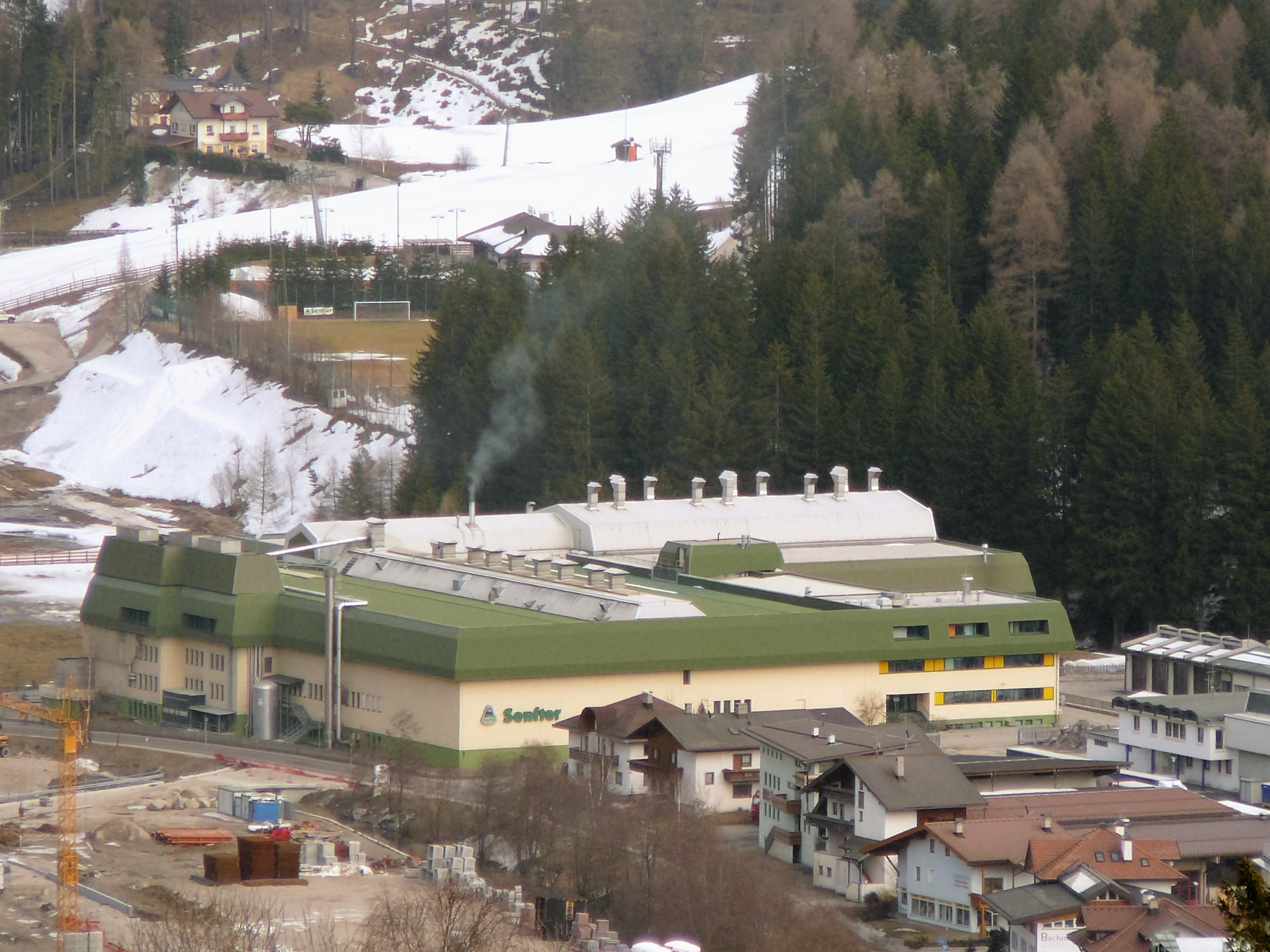 Lo stabilimento di Senfter a San Candido